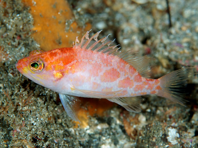 ニシキハナダイ Plectranthias sagamiensis